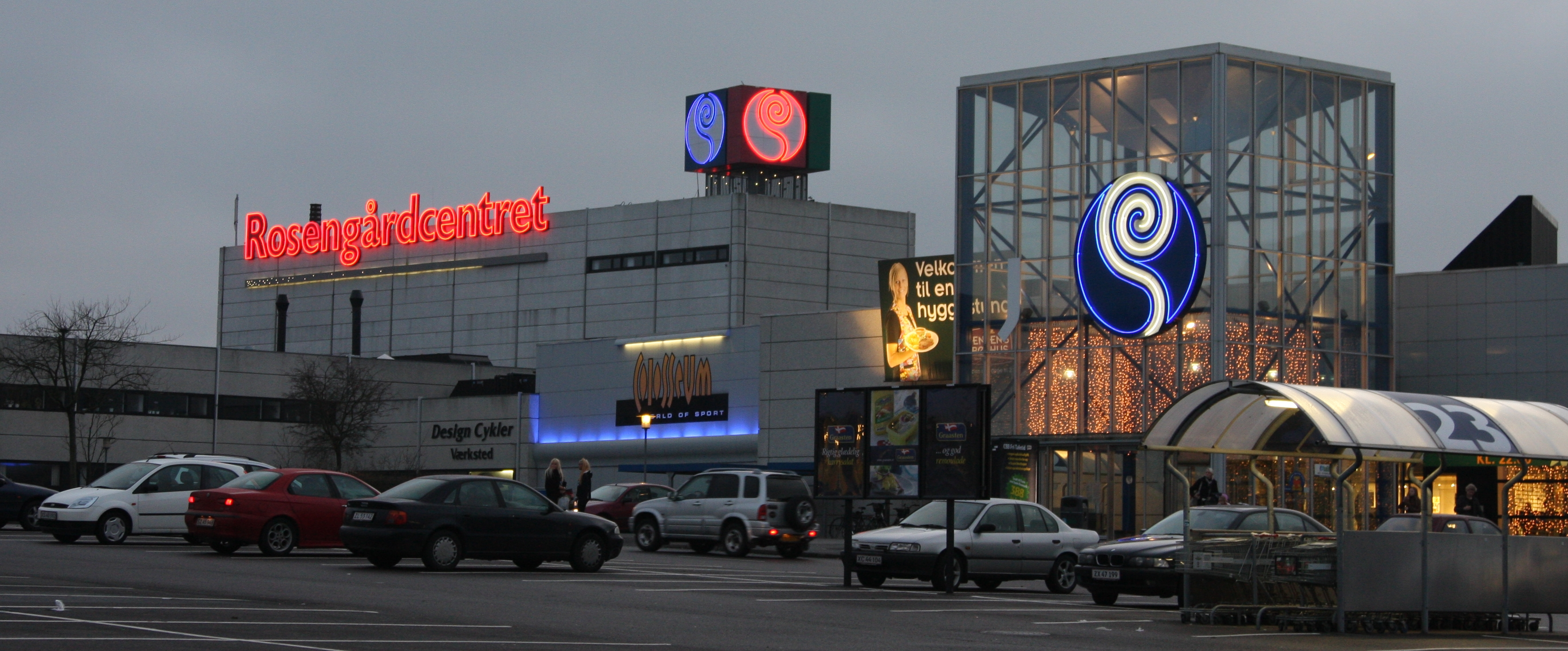 Rosengårdcentret, Odense / Rosengårdcentret is a shopping centre in Odense, Funen, Denmark